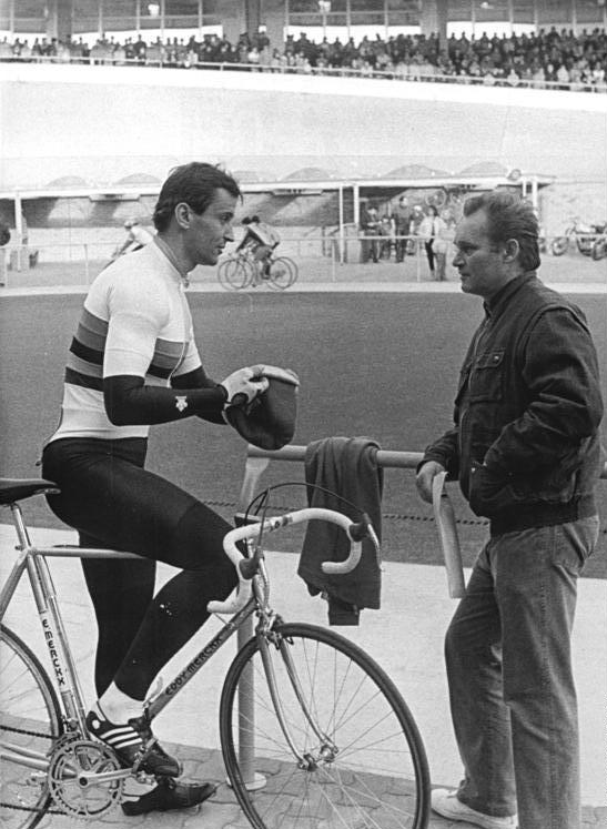 Lutz Heßlich, Peter Krüger Zum Beitrag: Die zwei Auftritte des Lutz Heßlich - Rad-Asse des Lobes voll über neue Cottbuser Bahn ADN-ZB Weisfolg - 19.11.1987 - ha. Sprintweltmeister Lutz Heßlich während des Trainigs auf der neuen Cottbuser Radrennbahn im Gespäch mit seinem Trainer Peter Krüger. Der Träger des Regenbogentrikots wird im Januar des kommenden Jahres 29 und hat noch einige Pläne, um seine bereits ansehliche Medaillen-Sammlung zu vergrößern. (Hierzu gehören 1987-1119-300 - 302 N)